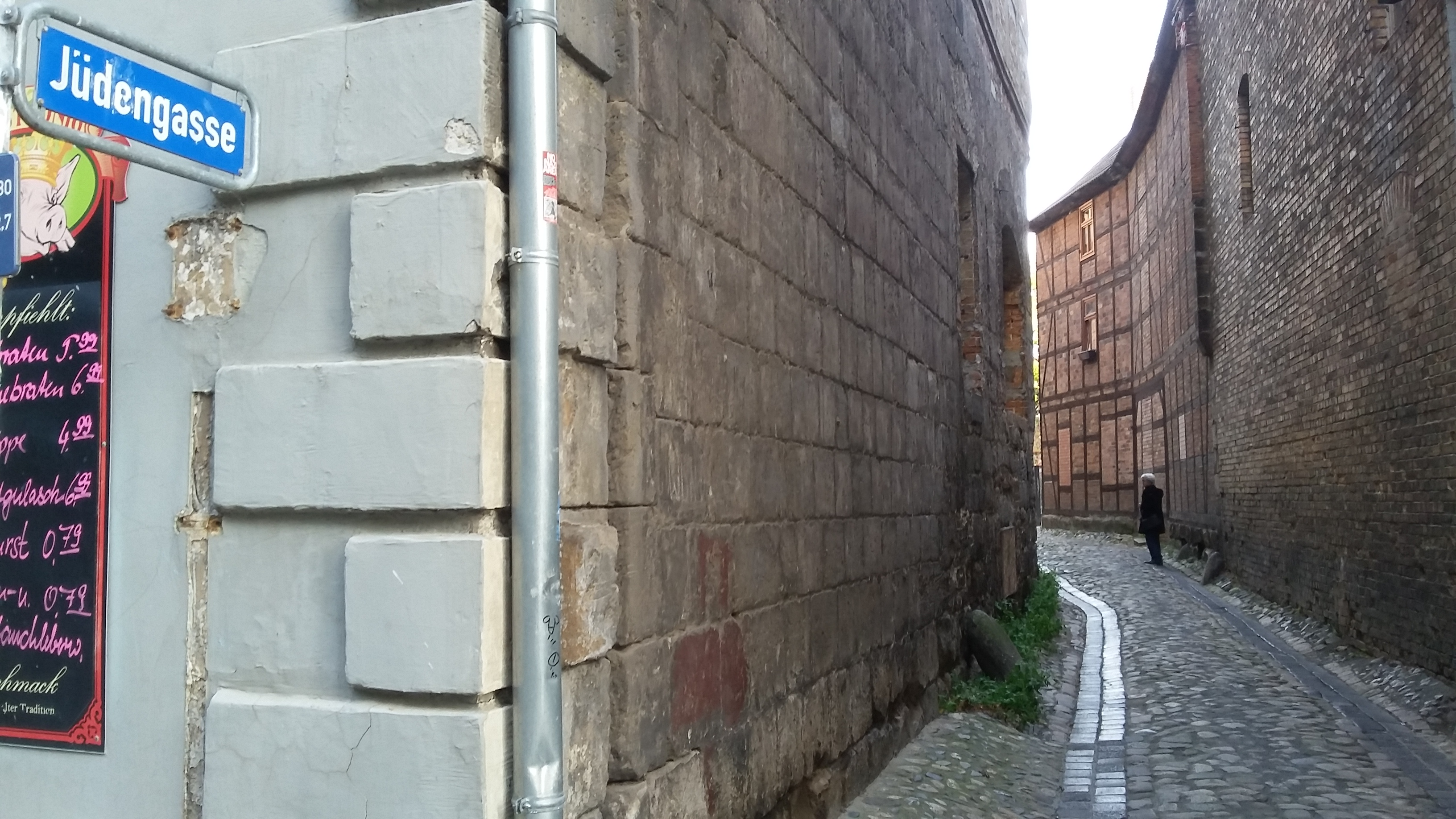 Jüdengasse Quedlinburg mit Straßenschild